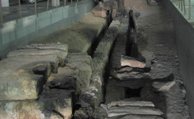 Restos del Acueducto Aqua Fontis Aureae integrados en el aparcamiento de la Estación de Autobuses, en Córdoba (España)